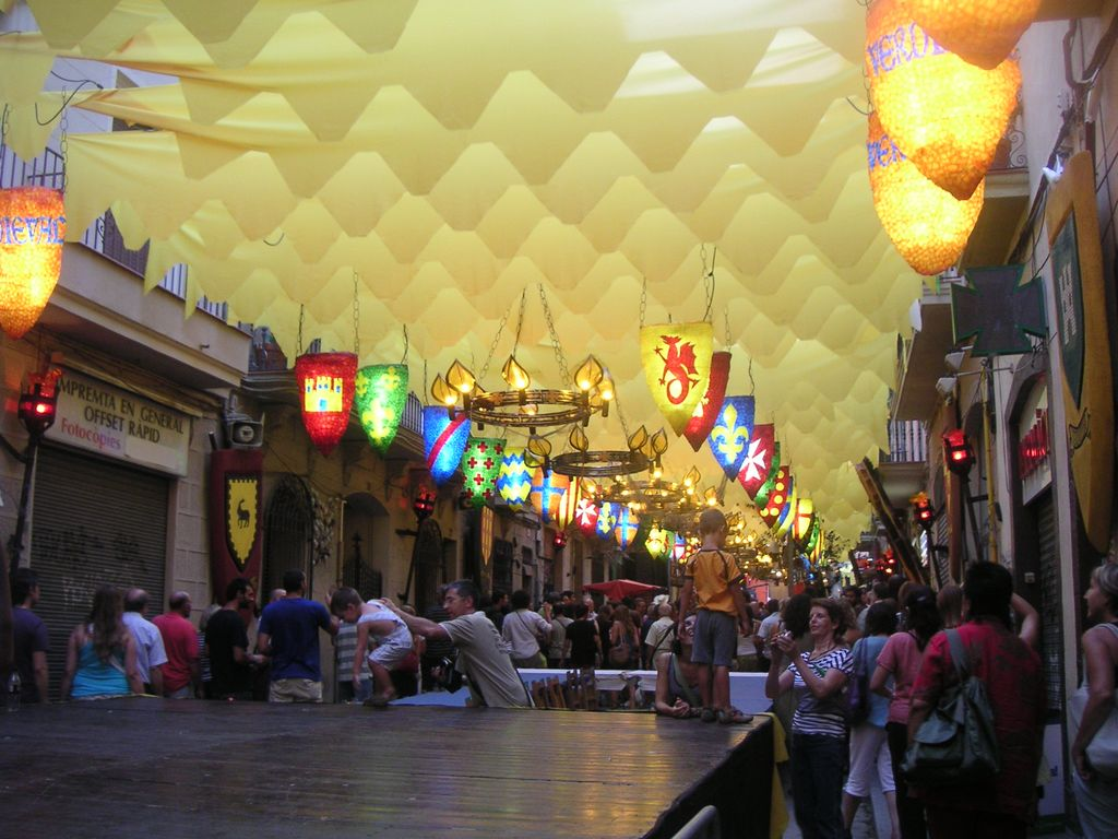 Decoració del carrer Verdi, guanyador de 2009.